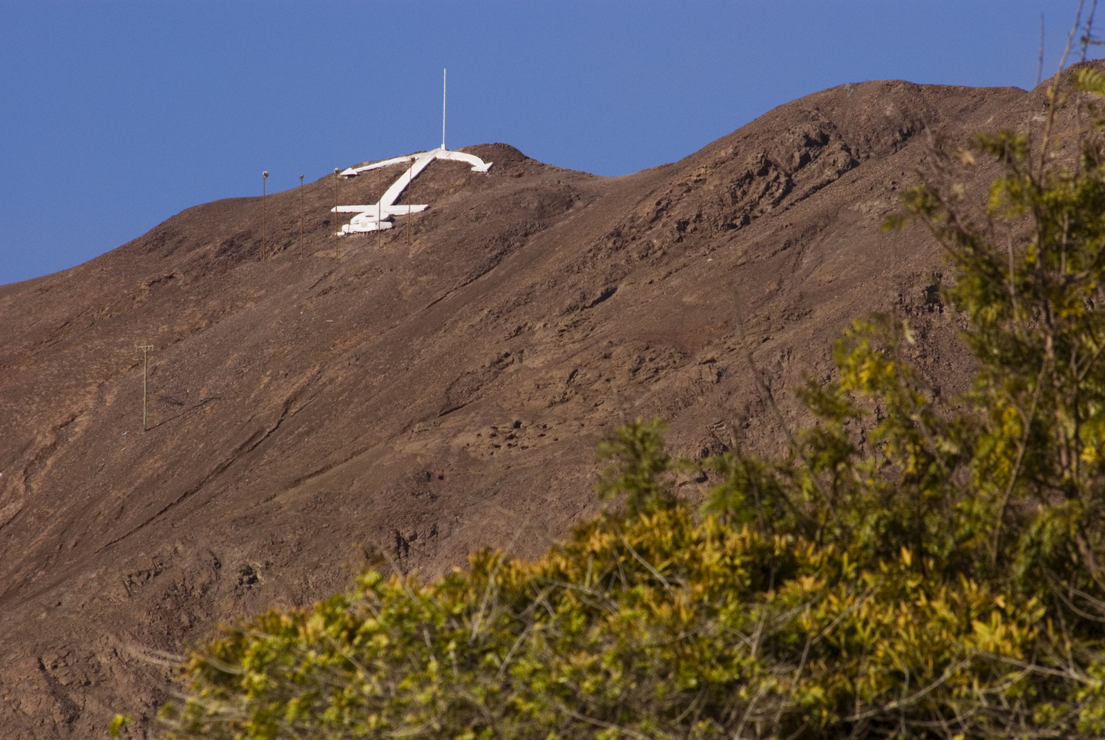 Cerro El Ancla.